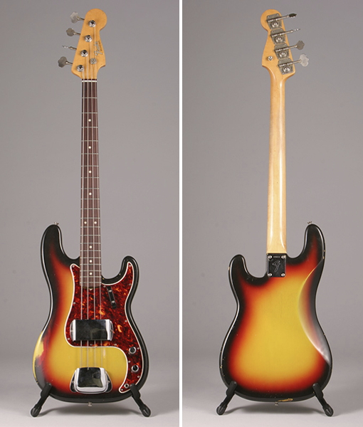 Vintage Fender Precision Bass